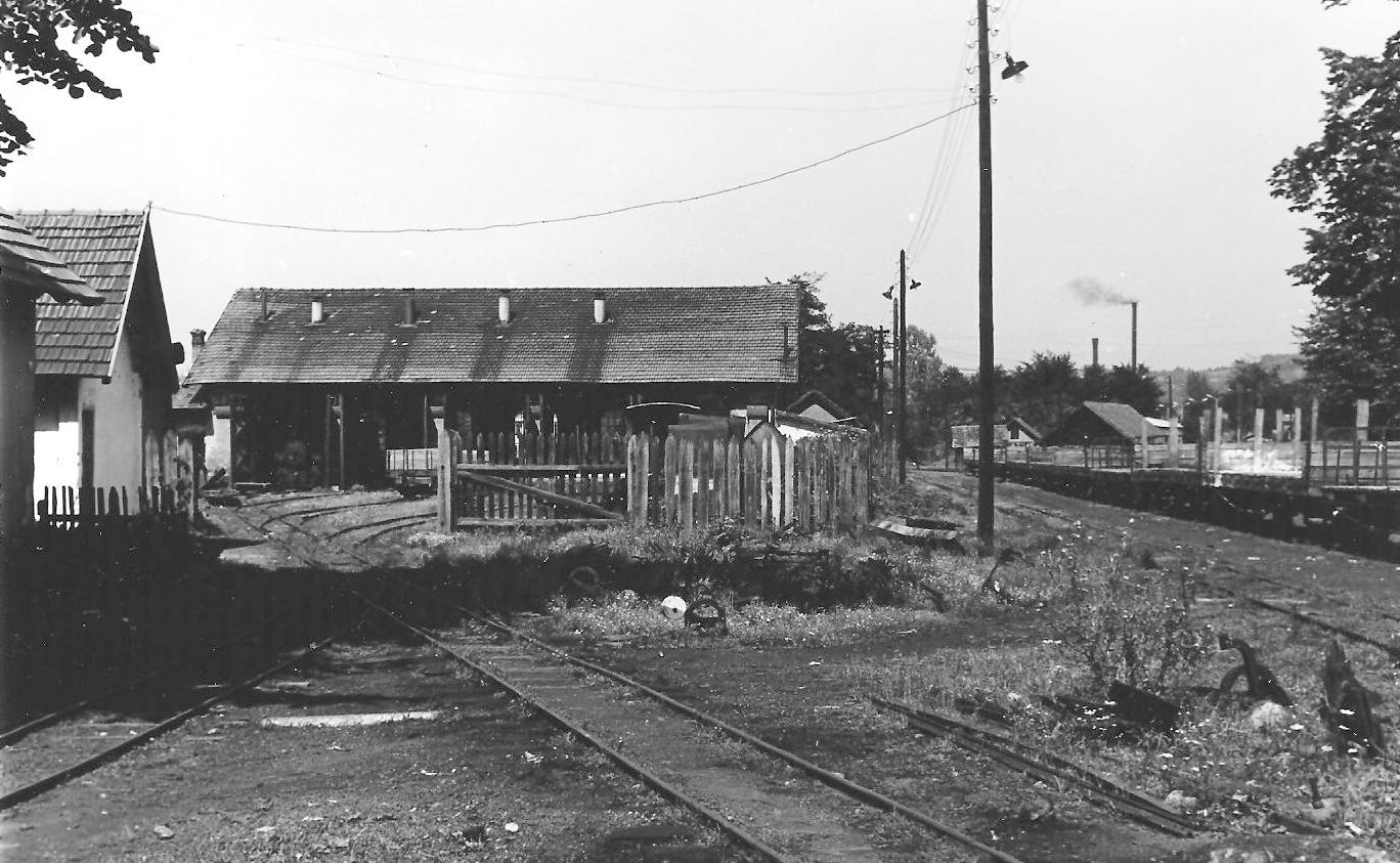 Heizhaus der 'Borja', Usoratal Waldbahn, Teslic